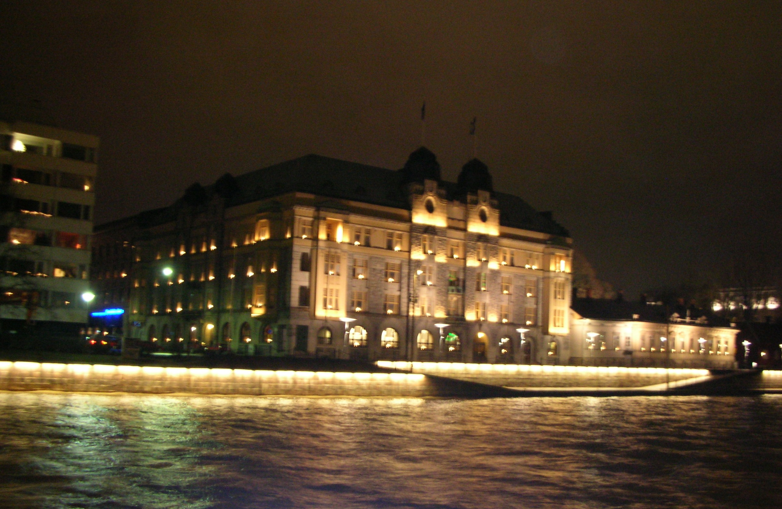 Aurajoen rannalla sijaitseva Turun kaupunginkanslia illalla